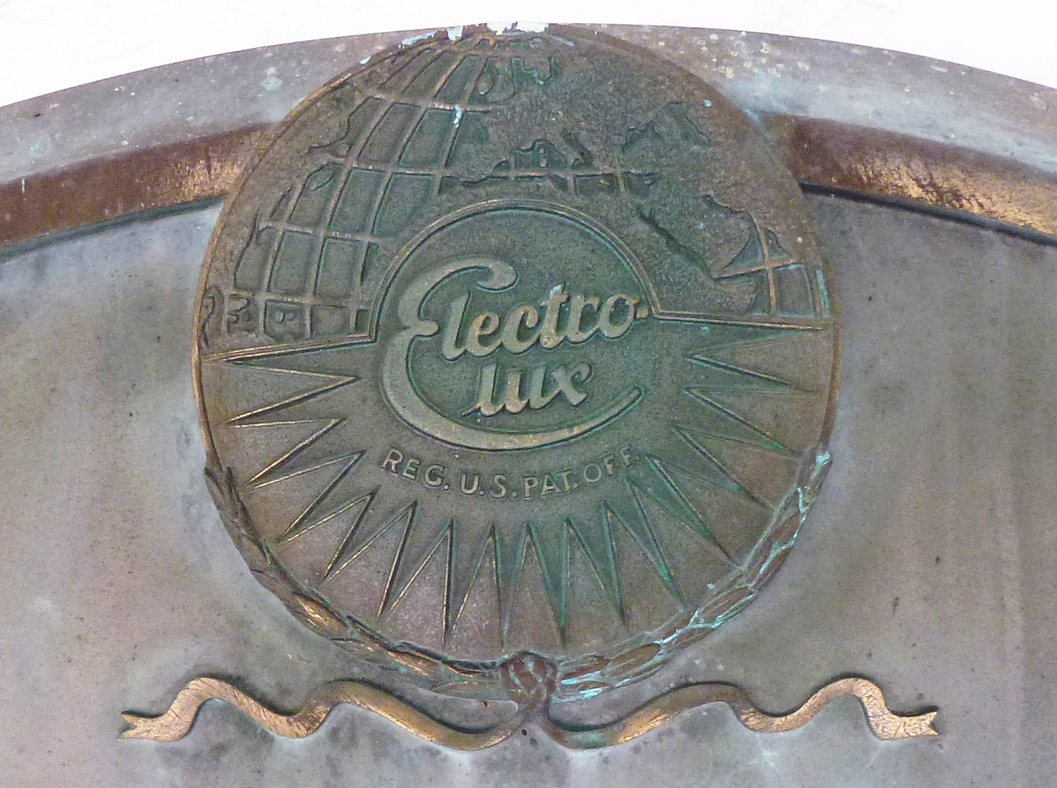 Häringe slott rotundan, minnestavla Wenner Gren